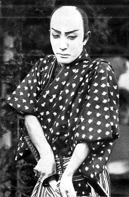 『鮮血の手型』（1923年）のスチル写真、阪東妻三郎。